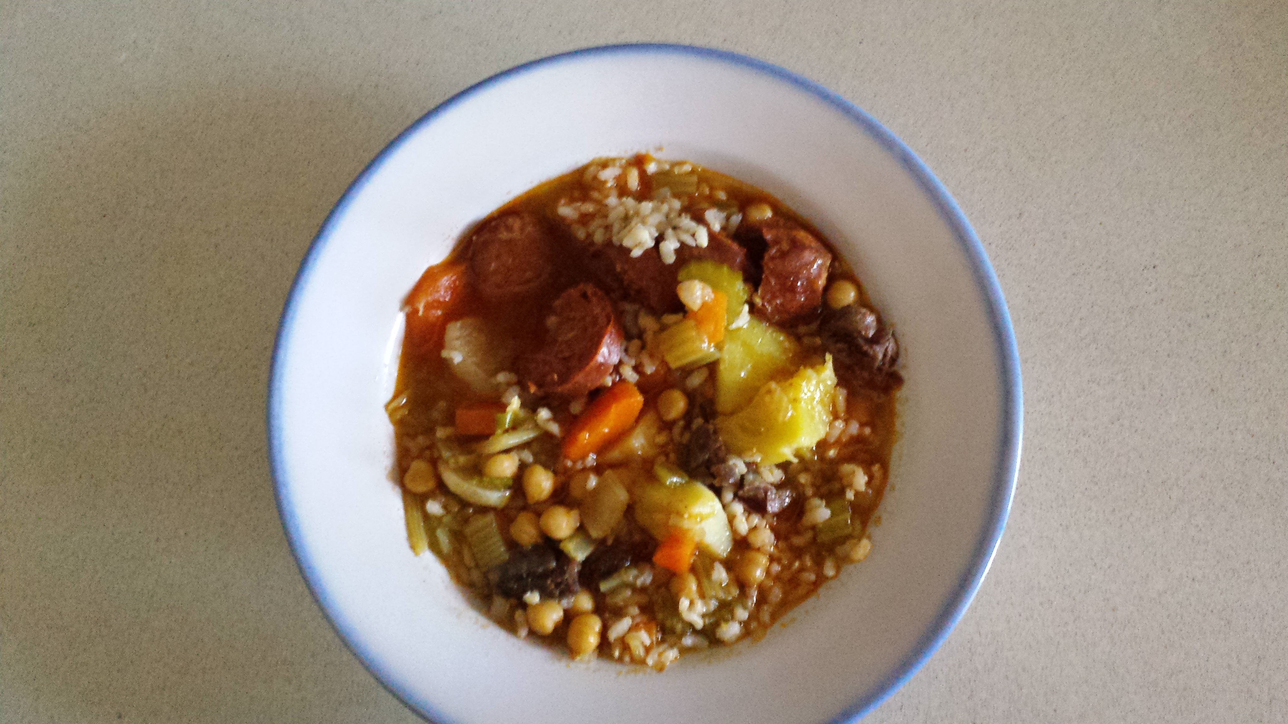 Potaje de garbanzos, Cádiz, España.